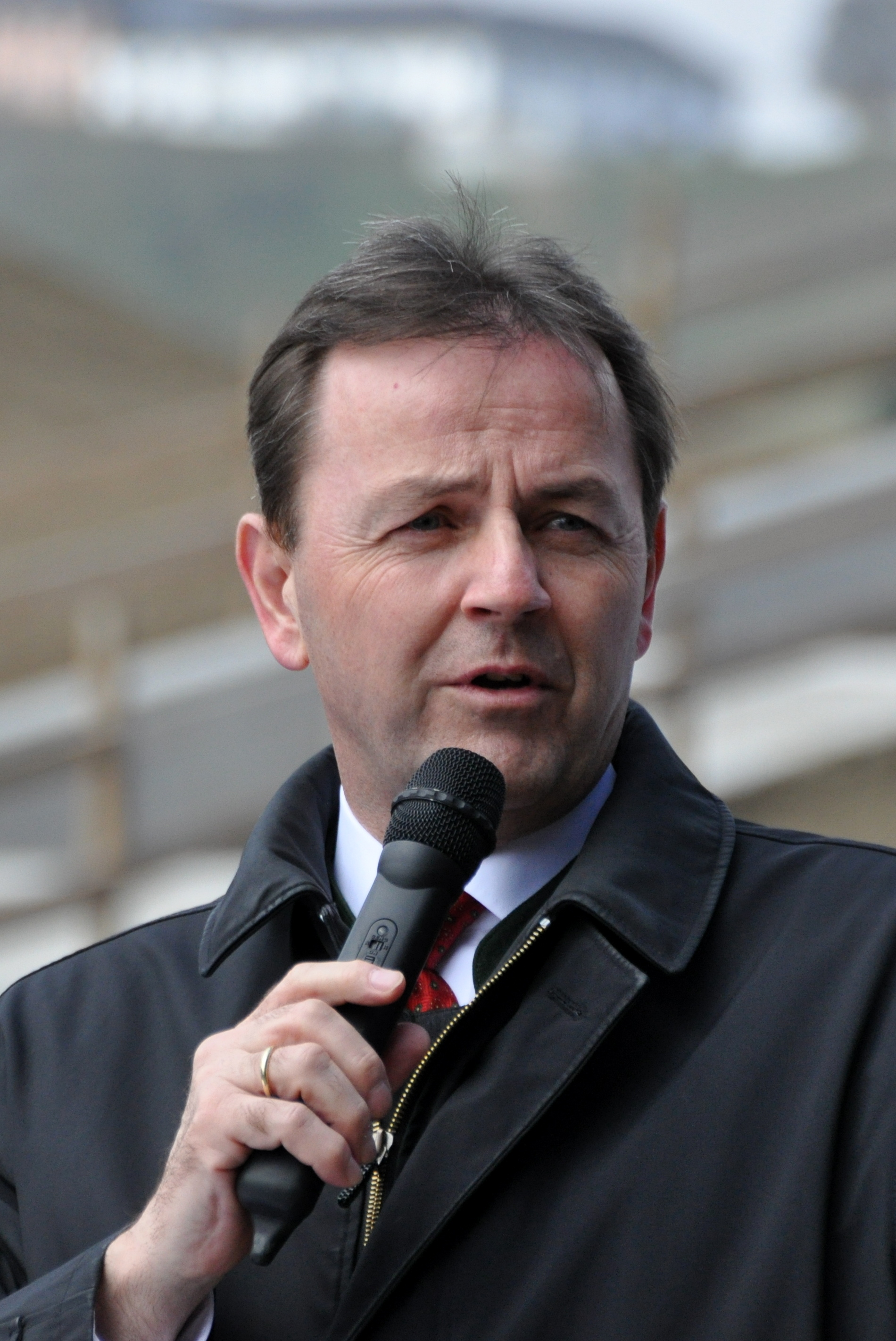 Nikolaus Berlakovich bei der Eröffnung des Hochwasser-Rückhaltebeckens Mühlholz in St. Gotthard im Mühlkreis